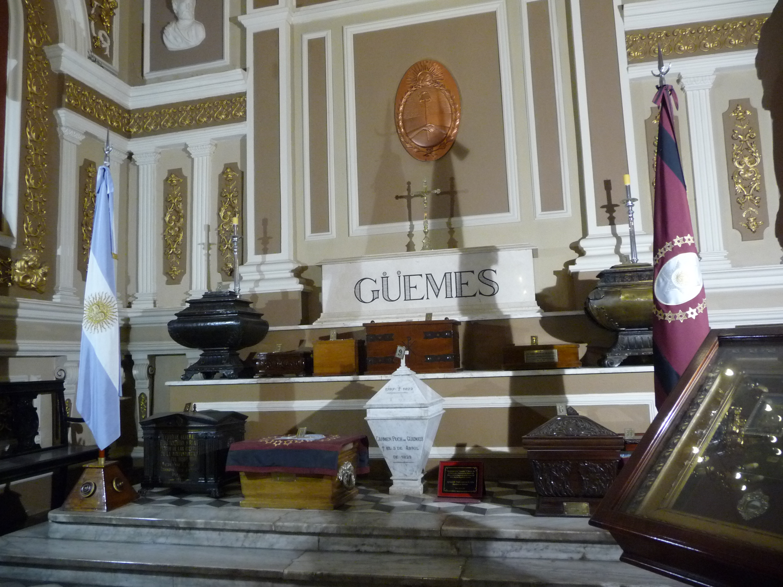 Panteón de las Glorias del Norte en la Catedral de Salta, donde se encuentran los restos de varios patriotas que participaron en las guerras de la independencia de Argentina, entre ellos el Gral. Güemes.